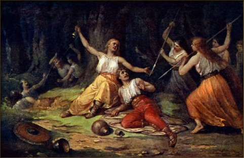 Josef Mathauser - Šárka zrazuje Ctirada